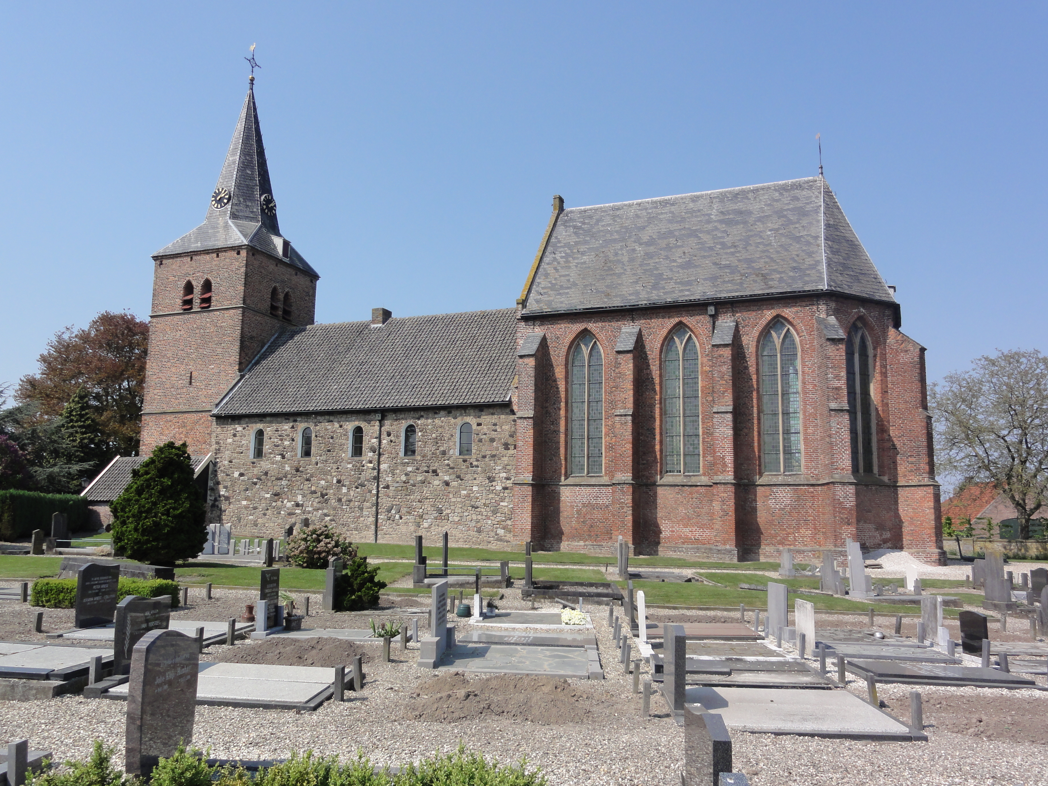 Andelst